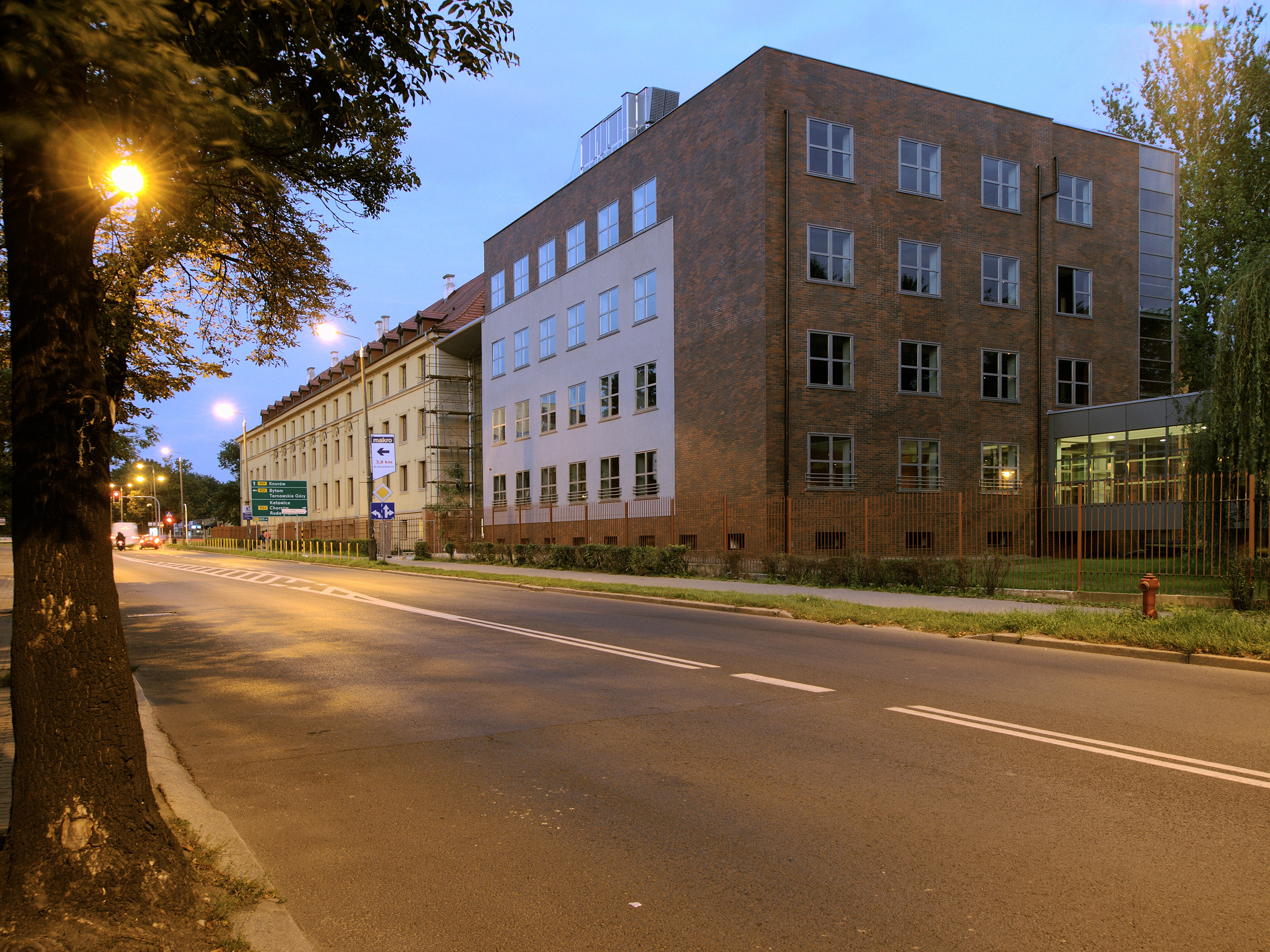 Przebudowa budynku na Roosevelta w Zabrzu na potrzeby Politechniki Śląskiej. Widoczne budynki A i B Wydziału Organizacji i Zarządzania Politechniki Śląskiej w Gliwicach .